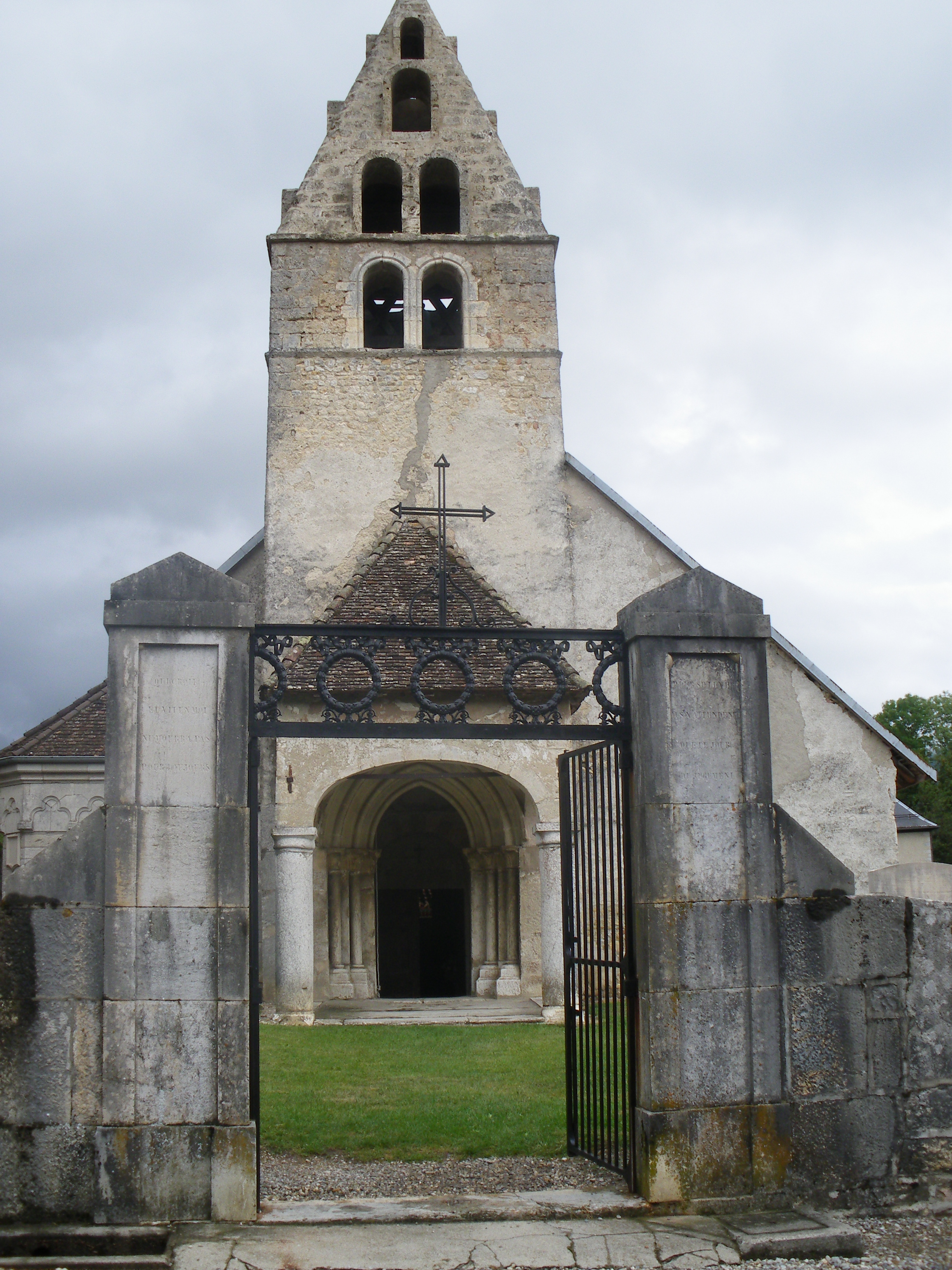 Eglise de Vieu